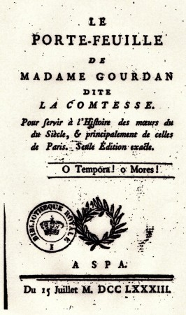 Book Le Porte-feuille de Madame Gourdan dite La Comtesse published 1783 public domain